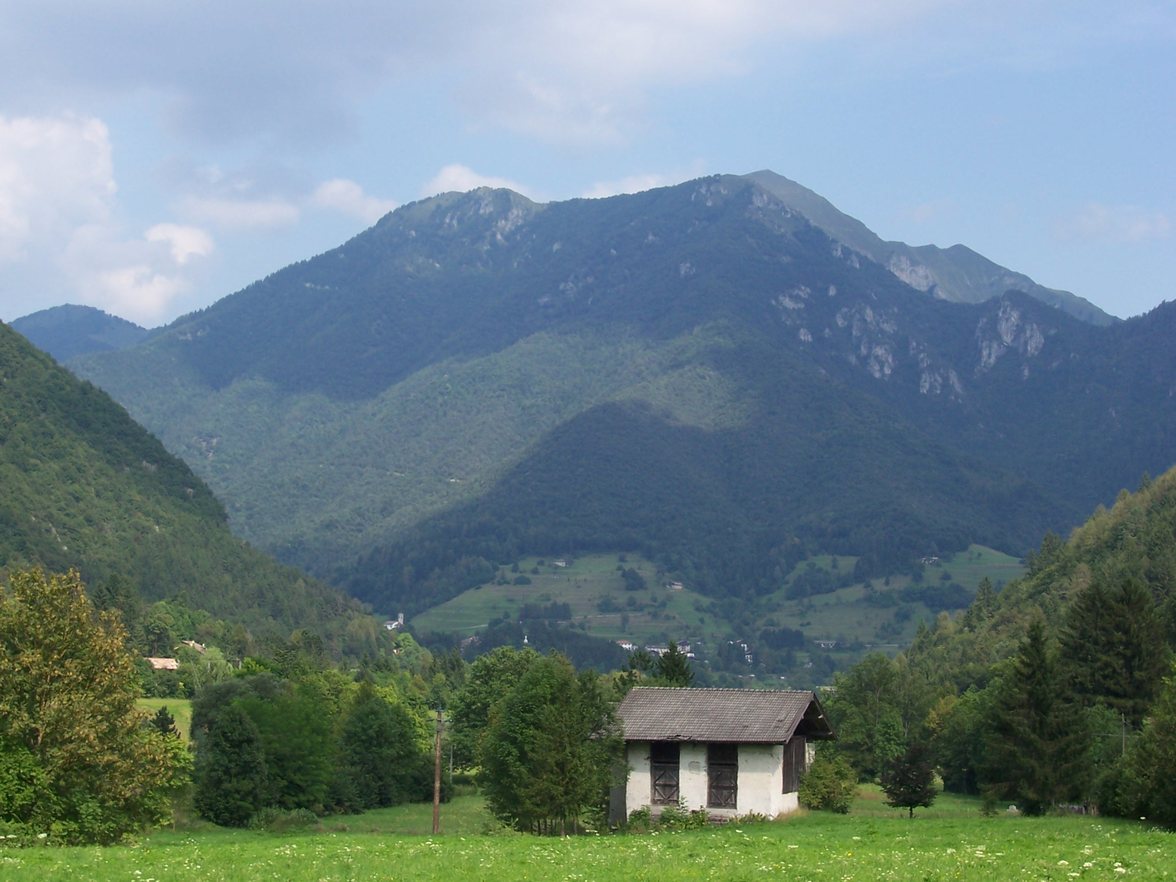 Bezzecca vista da Santa Lucia